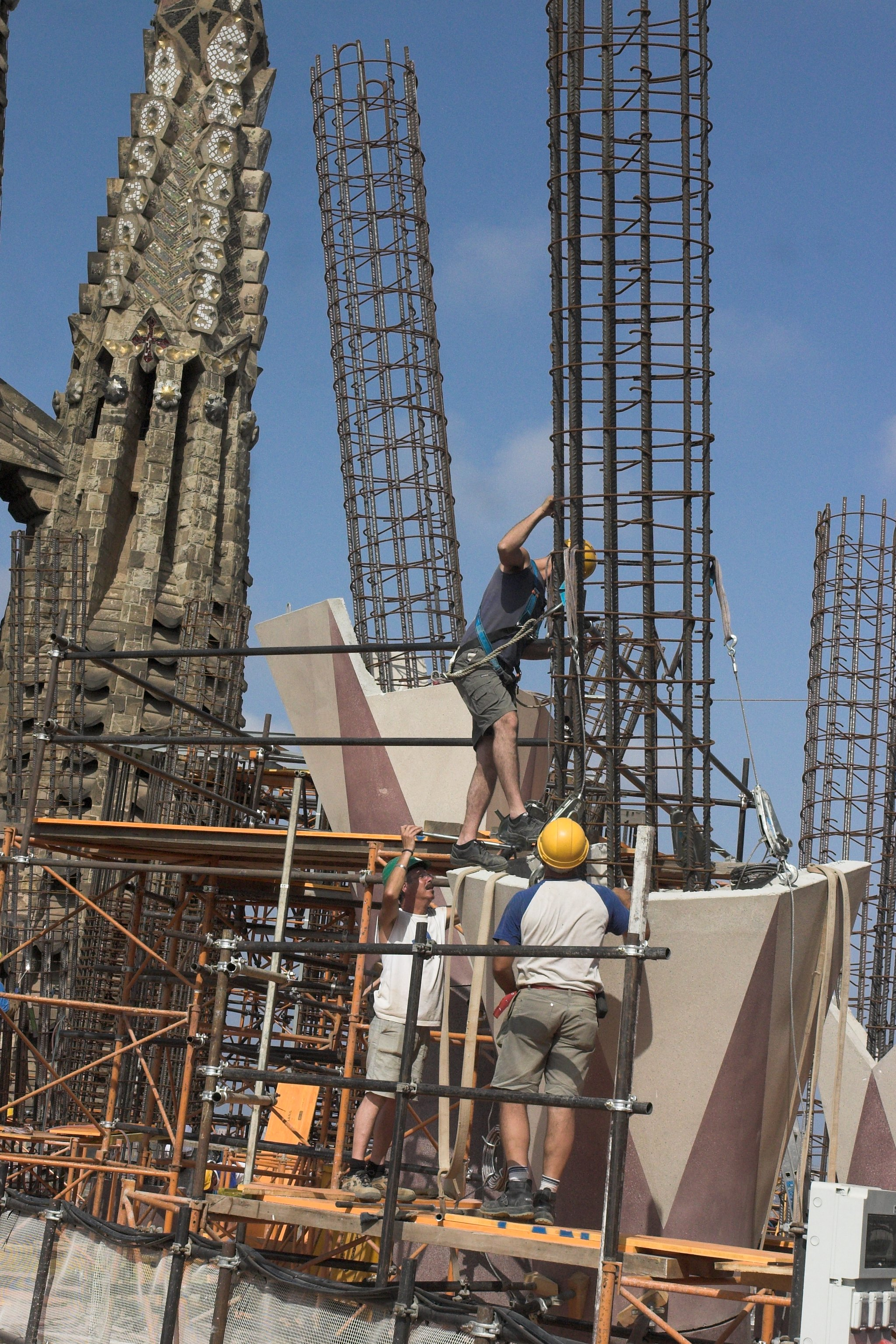 Treballs de la base de les torres dels evangelistes sobre la Nau Central de la Sagrada Família. (Barcelona-Catalunya)